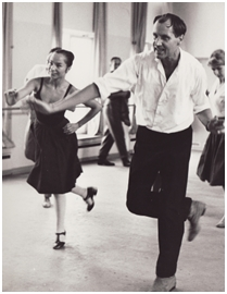 Otto Krüger beim Training im Ballettsaal in Essen